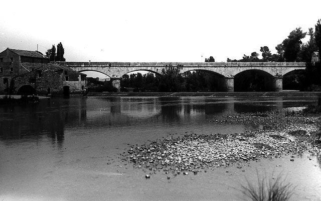 Puente sobre el río Duero - Tudela de Duero (Valladolid) - Ediciones Alarde - Oviedo. Lote Nº 2196. A la izquierda se observa el molino. - Tarjeta postal. Papel 144 x 88 B/N